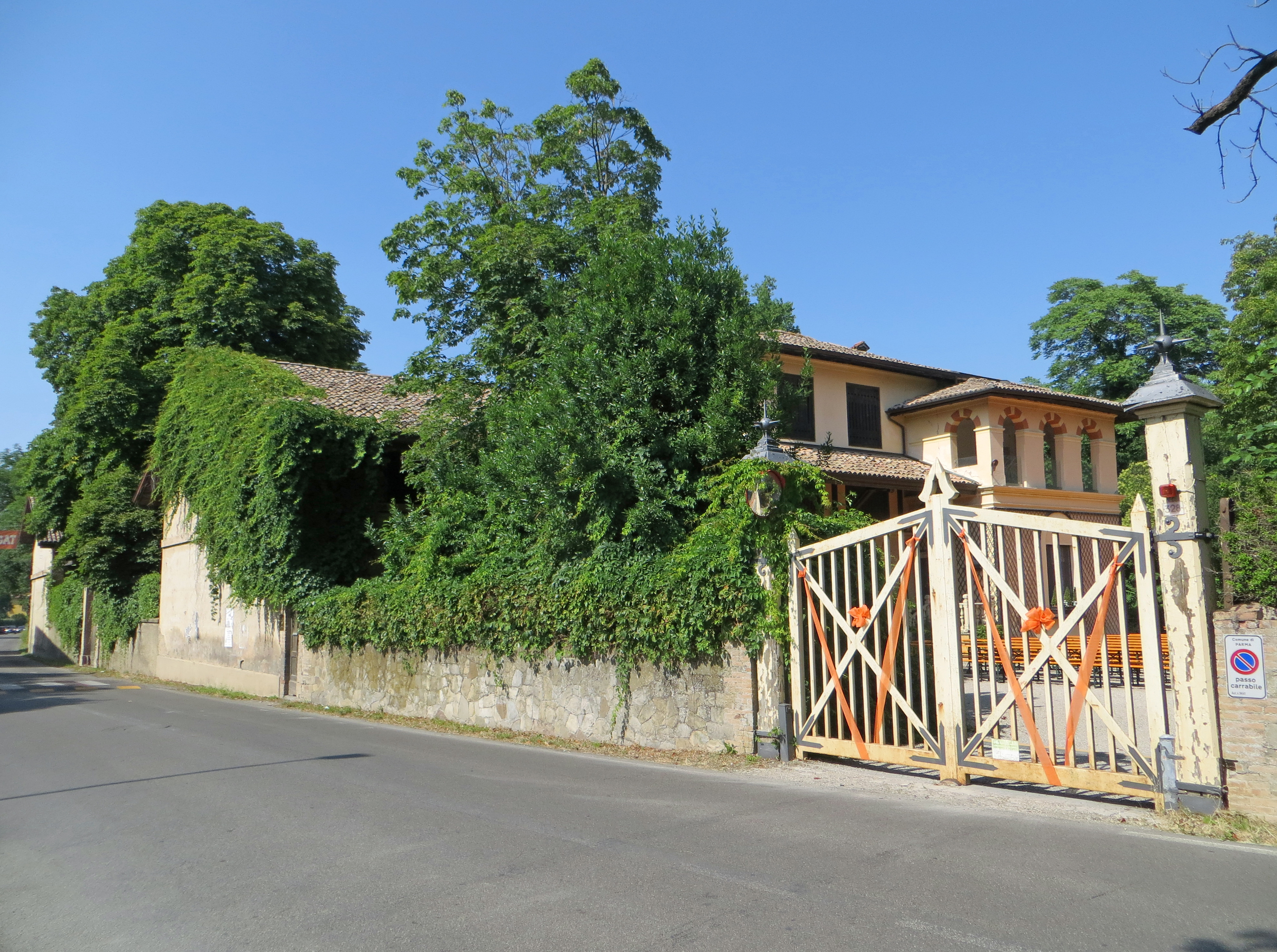 Villa Meli Lupi (Vigatto, Parma) - cancellata